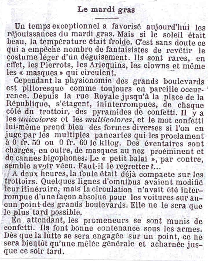 Article sur le mardi gras à Paris.